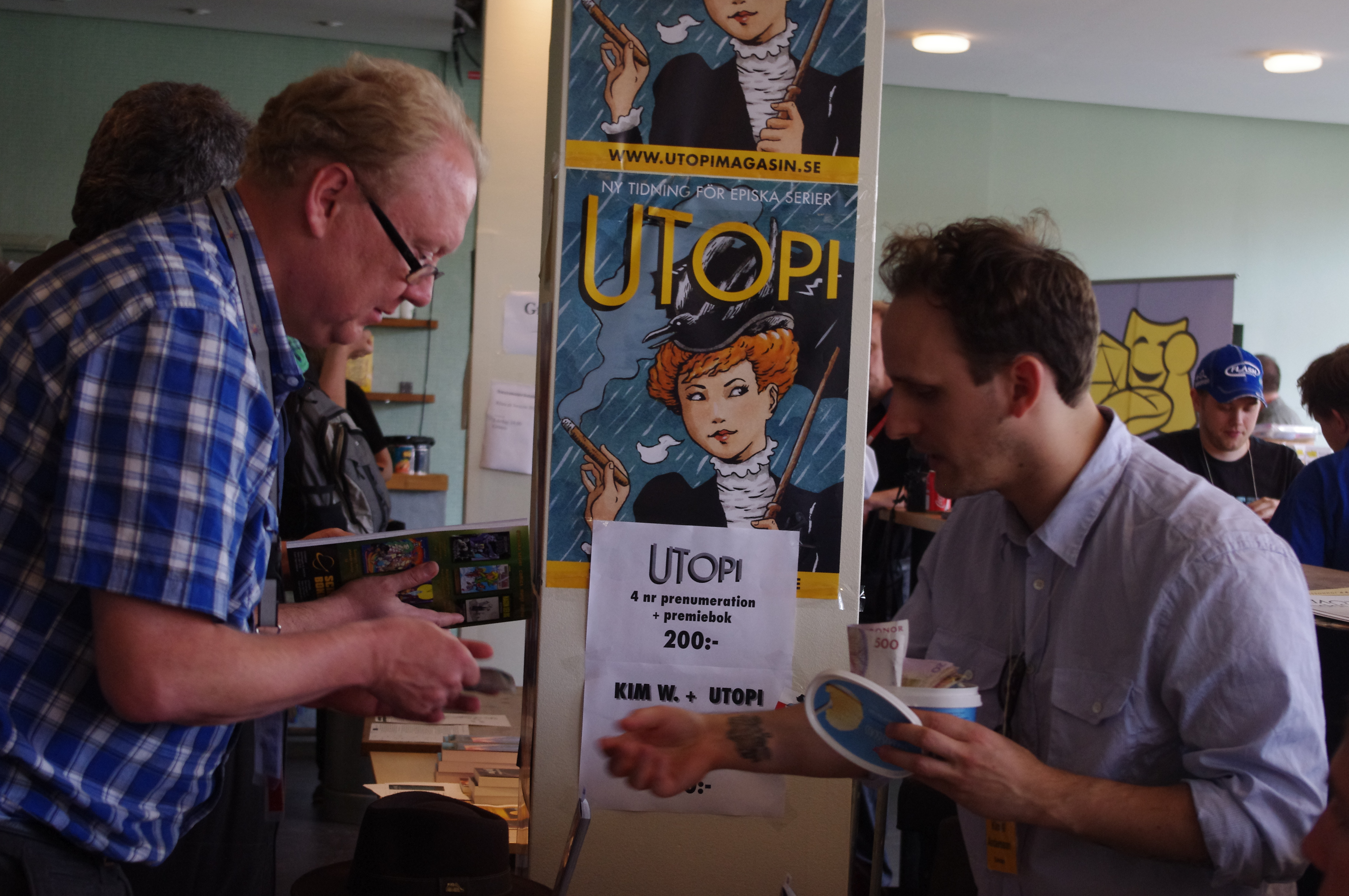 Kim W Andersson säljer Utopi på Eurocon i Stockholm.